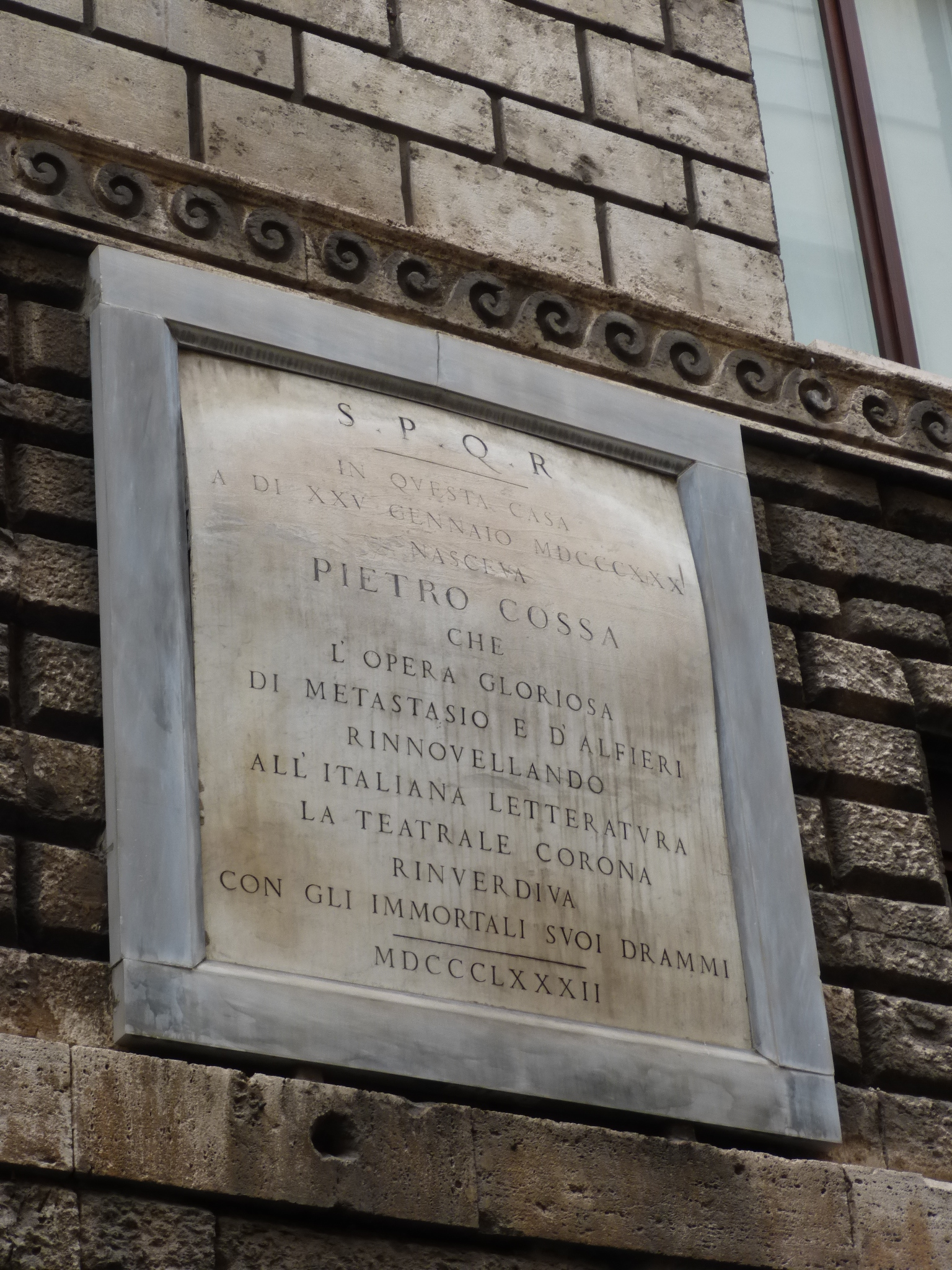 Roma, via del Governo Vecchio 14, memoria della casa natale di Pietro Cossa (1882)